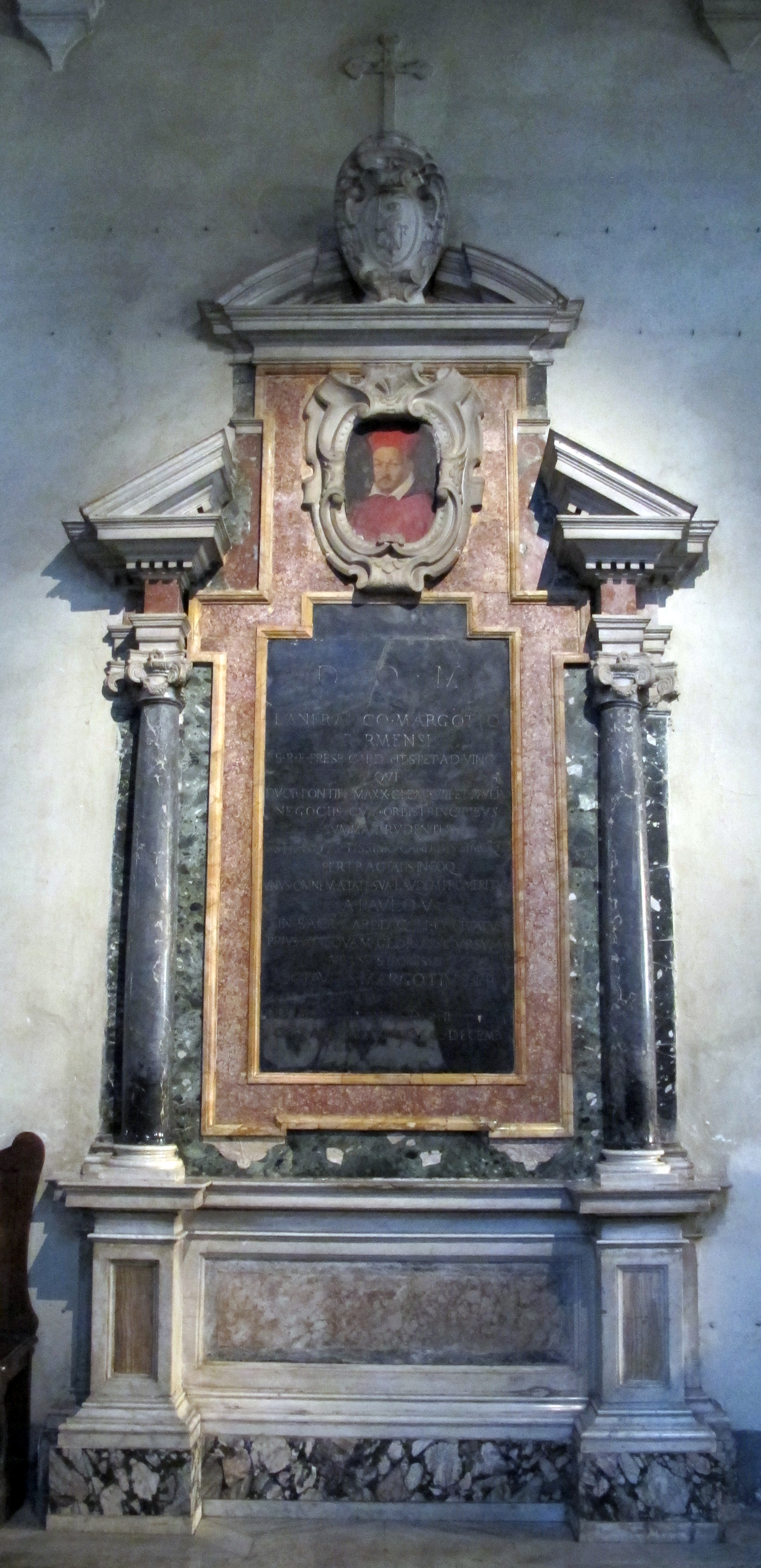 San pietro in vincoli, monumento al cardinale lanfranco margotti